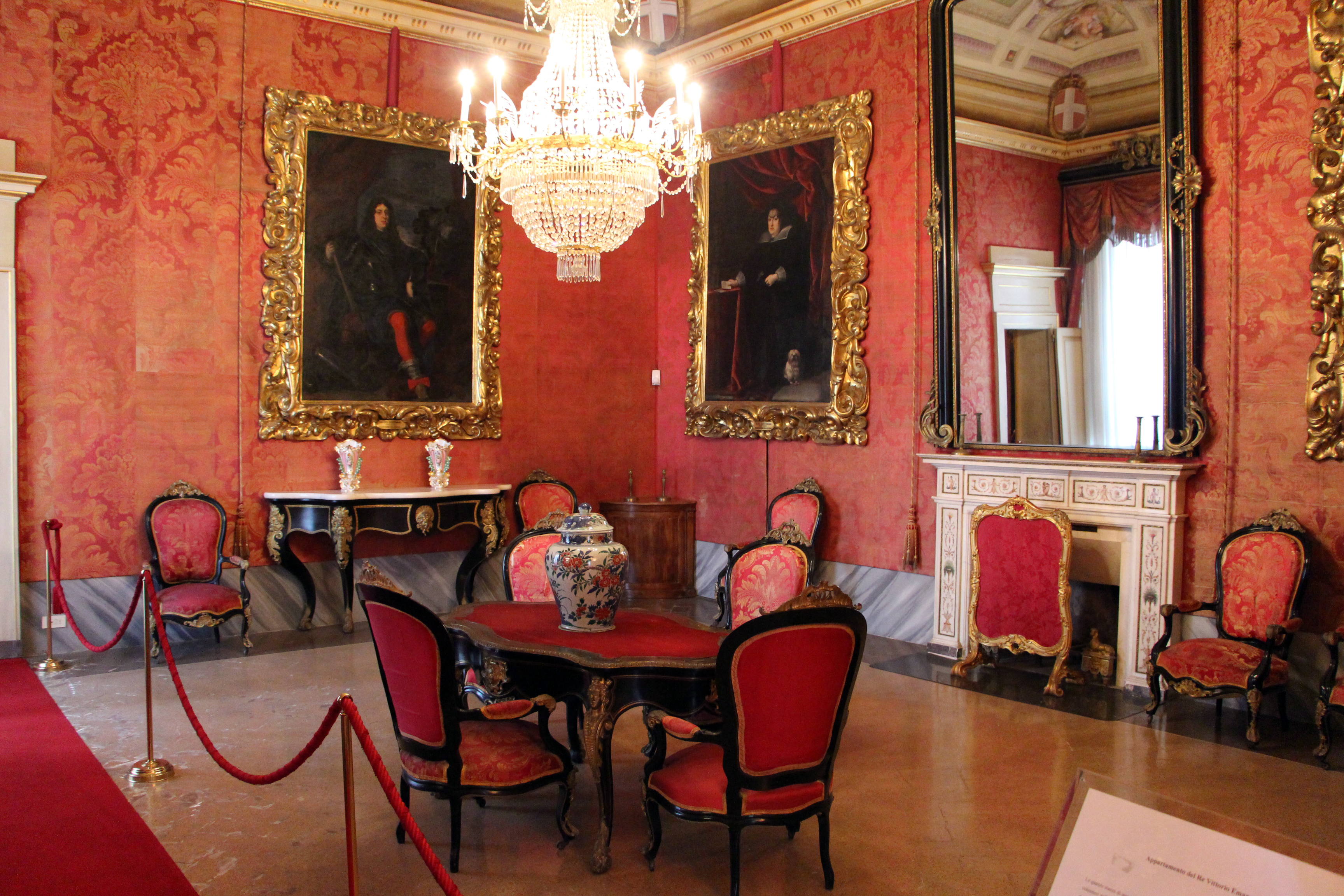 Villa medicea di Poggio a Caiano - MIBAC The making of this document was supported by Wikimedia CH. (Submit your project!) For all the files concerned, please see the category Supported by Wikimedia CH. This is a photo of a monument which is part of cultural heritage of Italy.